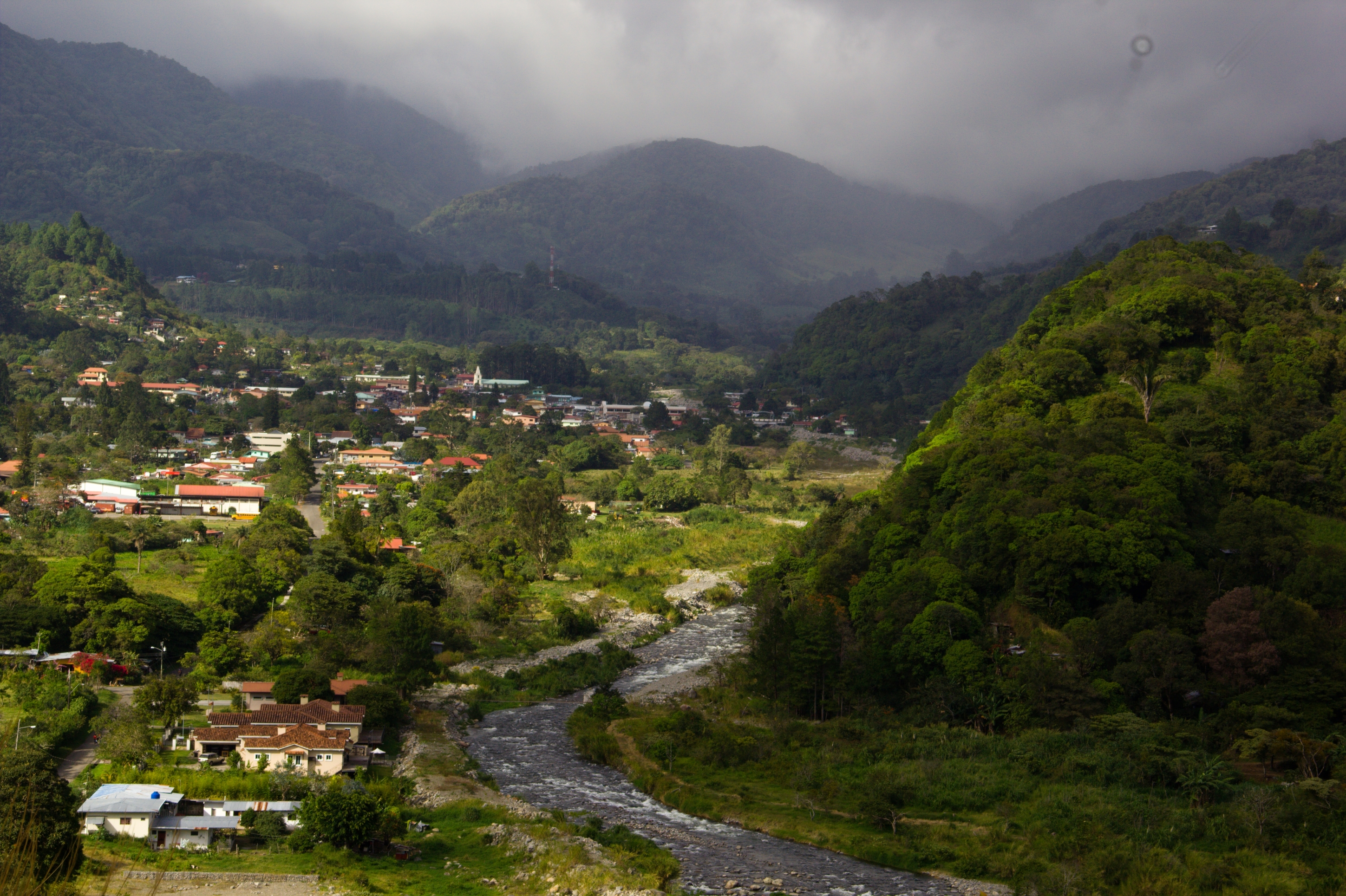 Vista del poblado de Boquete y el Río Caldera, provincia de Chiriquí, Panamá.